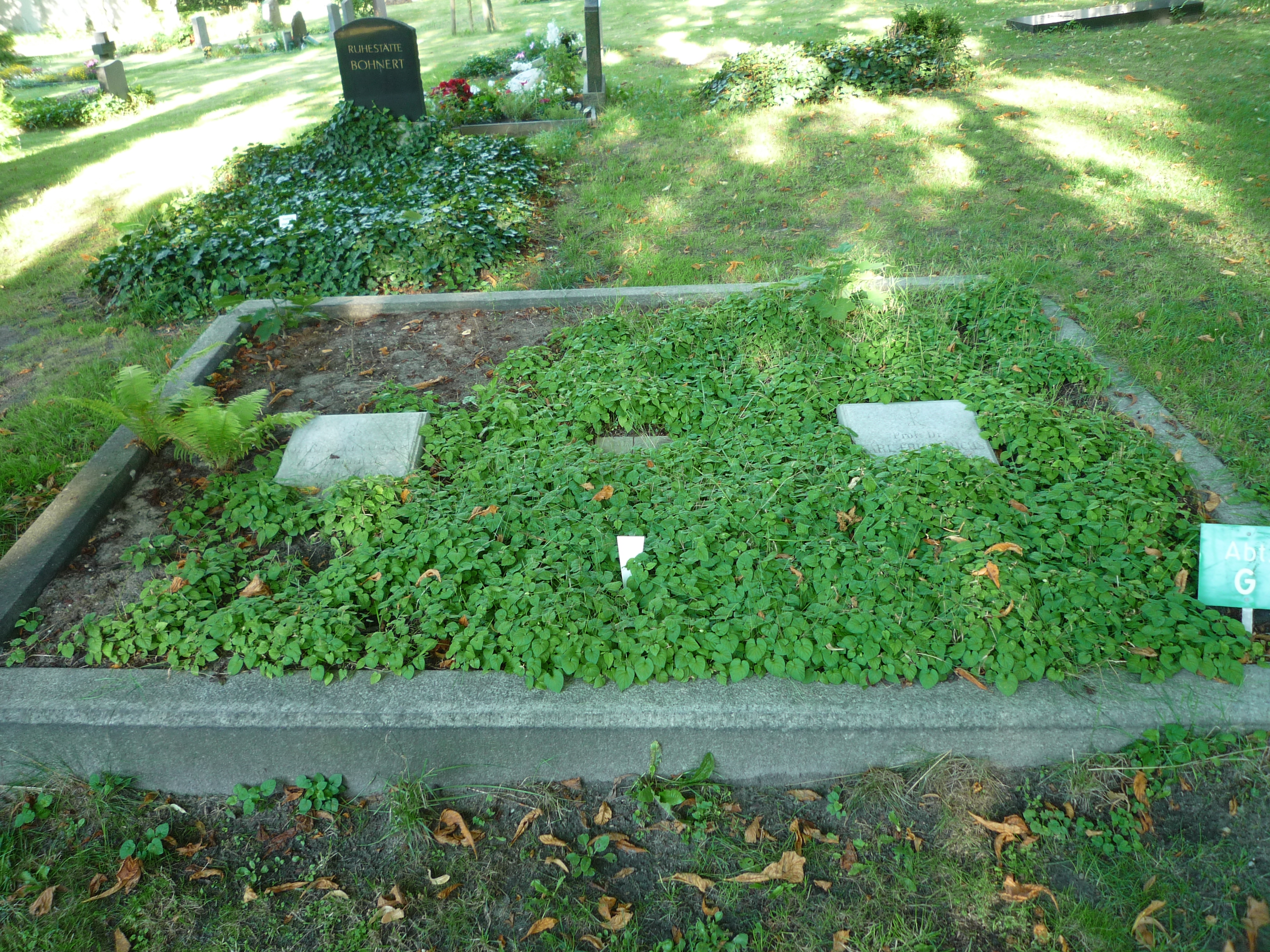 Alter St.-Matthäus-Kirchhof Berlin, Familiengrab Karl Friederichs, (Archäologe) / Foto: Wolfgang Schindler